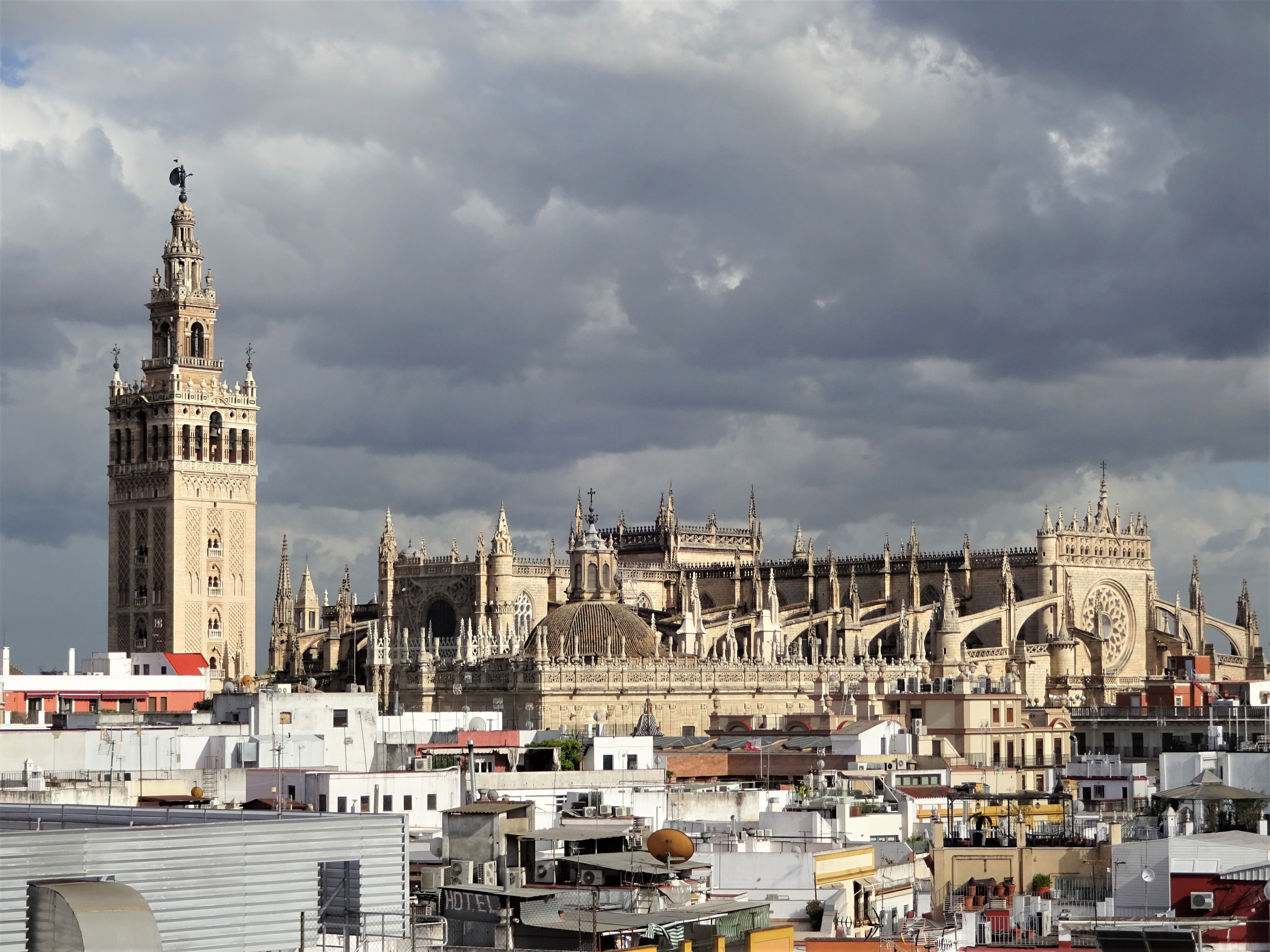 Kathedrale von Sevilla, von der Dachterrasse eines Hotels am Südrand des Pl. Nueva